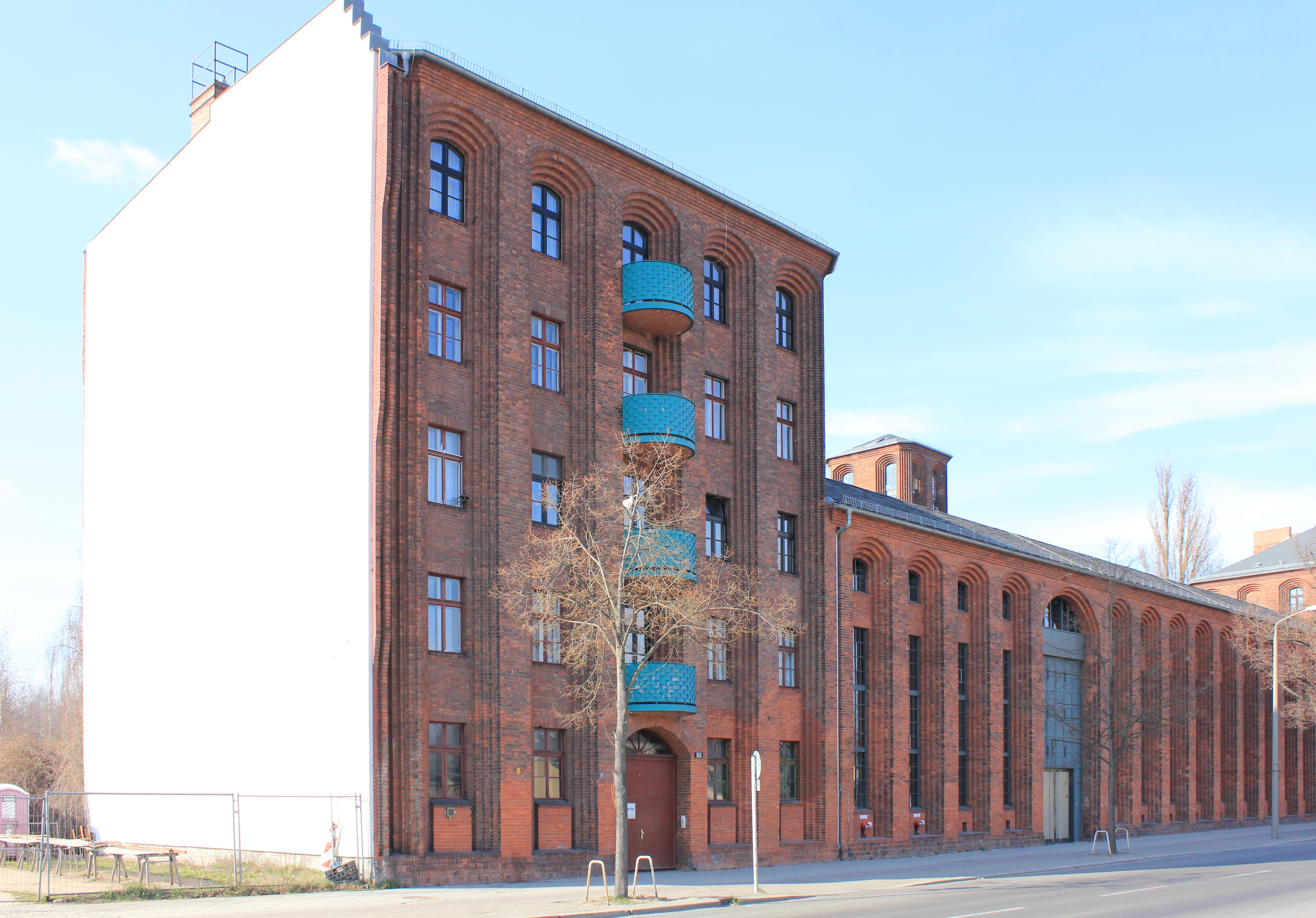 Umspannwerk Wilhelmsruh 1925-27 von Hans Heinrich Müller für die BEWAG